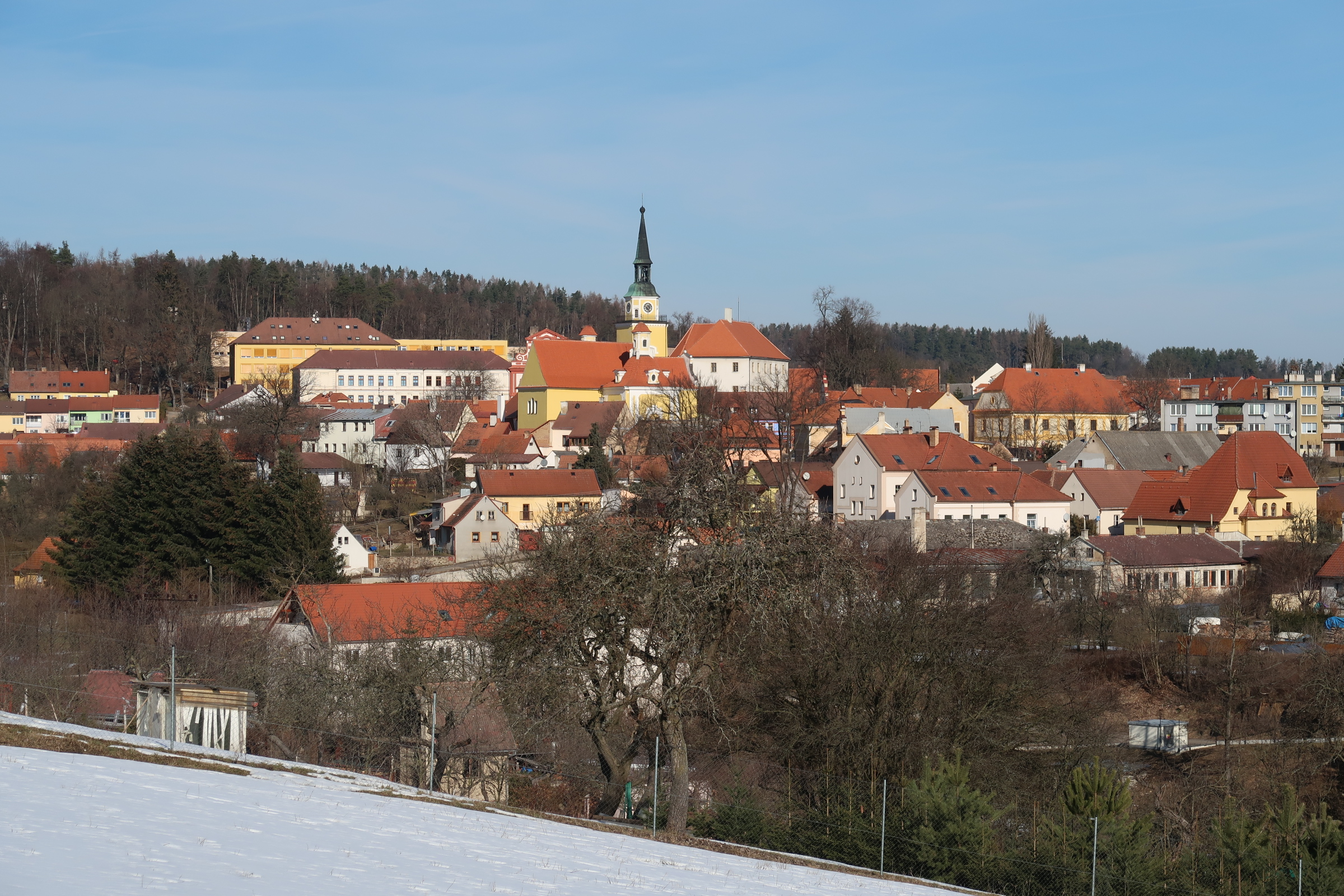 Panorama města od jihozápadu